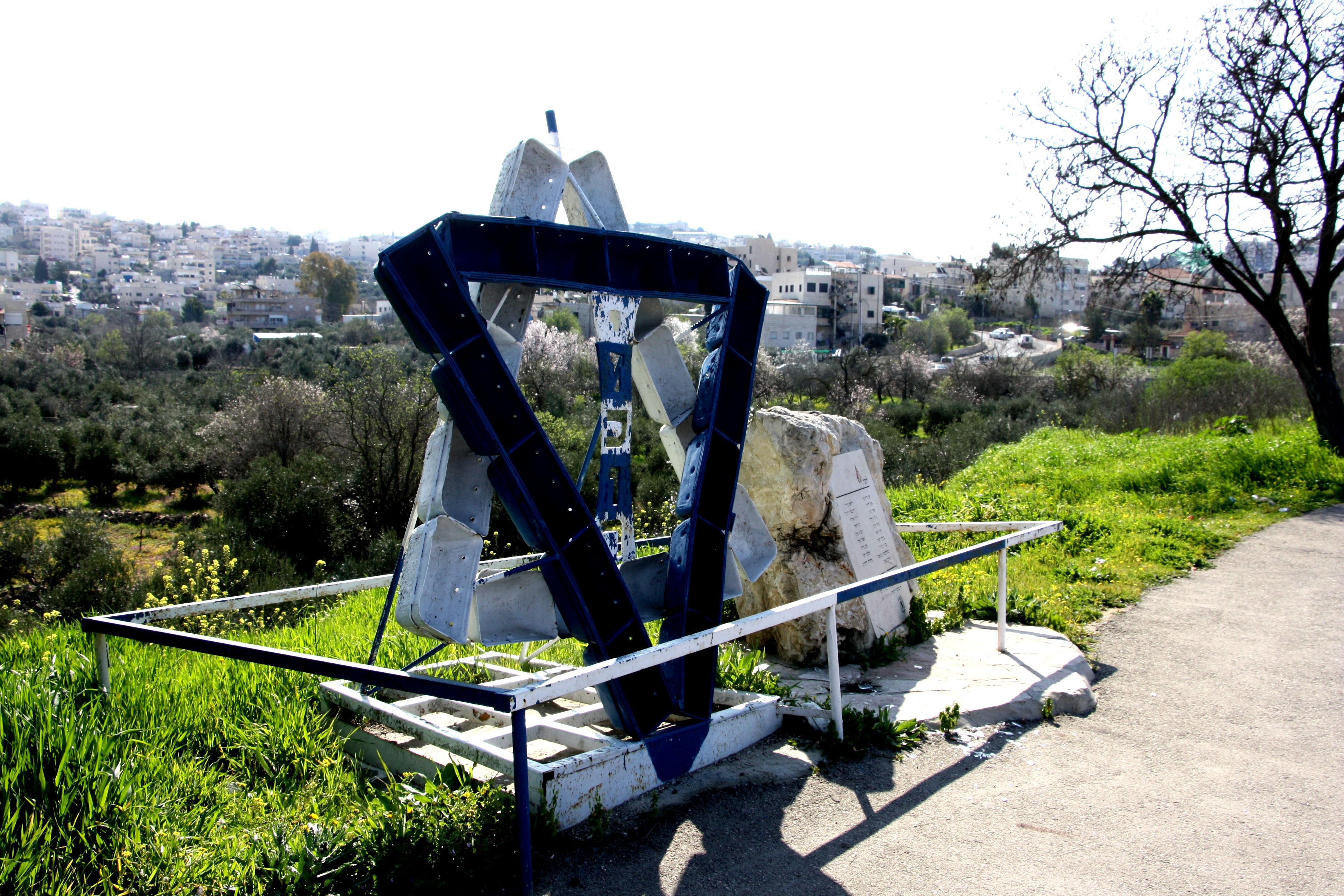 לוח זיכרון קו 32 צומת פת גילה ירושלים